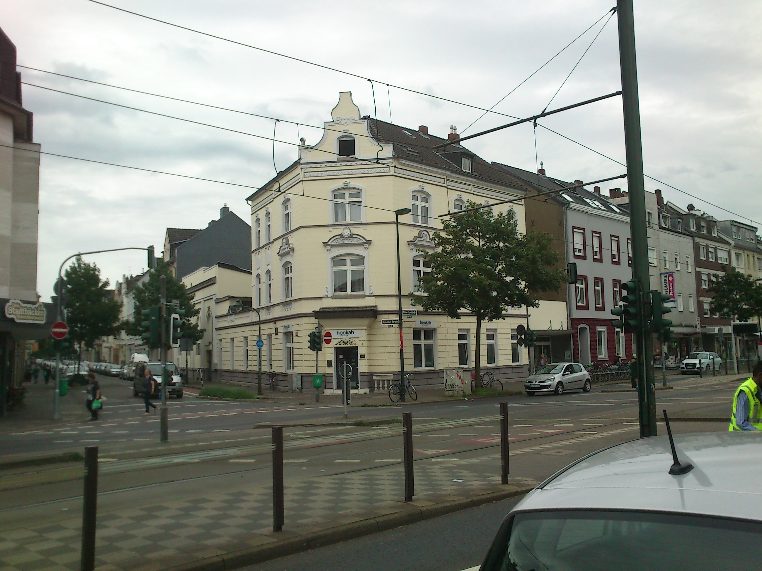 Düsseldorf-Wersten-Kölner Landstrasse 190 DNr 1639This is a photograph of an architectural monument., no. 1639